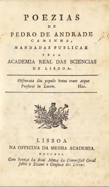 "Poezias" de Pedro Andrade Caminha, mandadas publicar em 1791 pela Academia Real das Sciencias de Lisboa